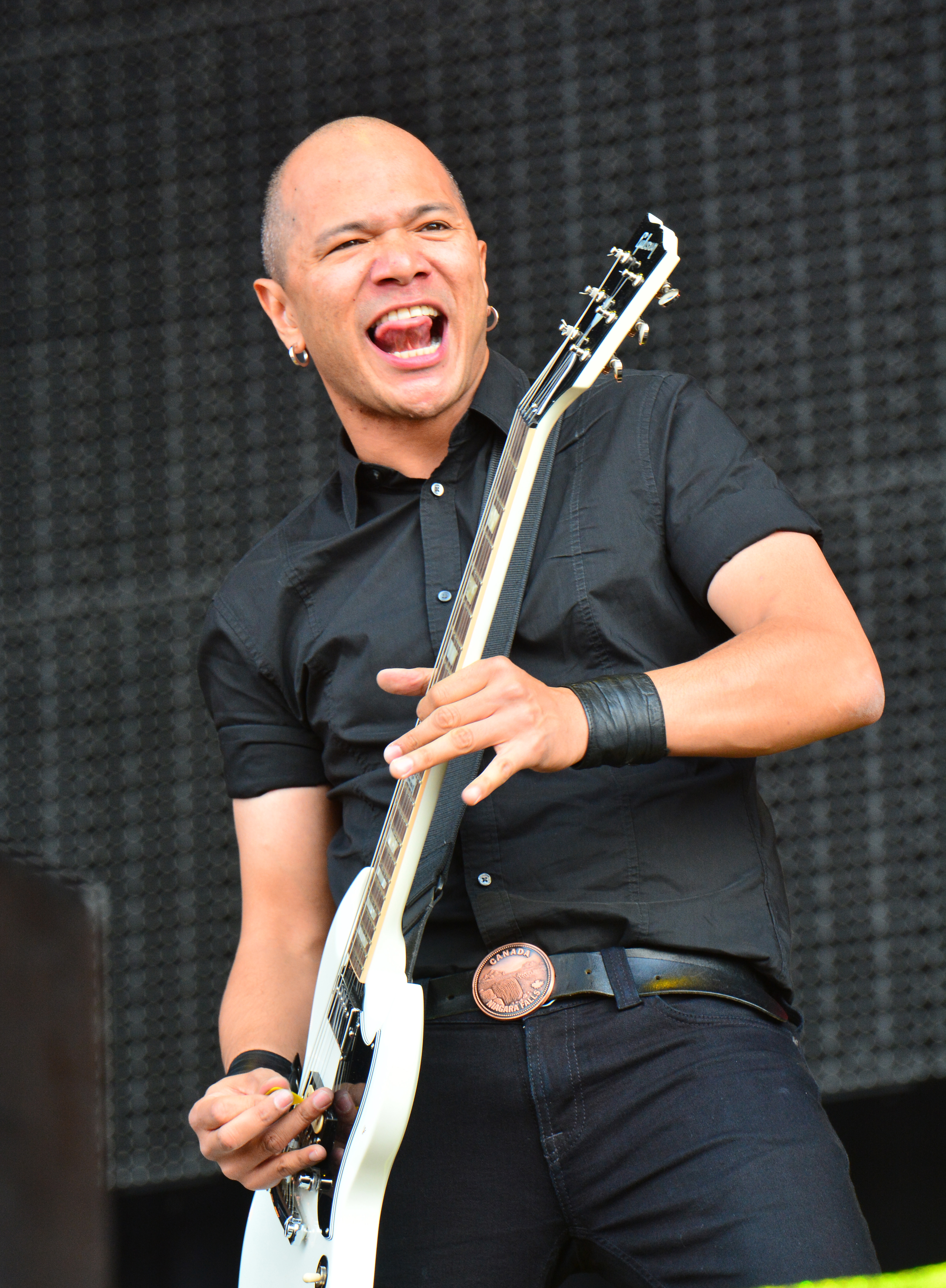 Danko Jones beim Wacken Open Air 2015